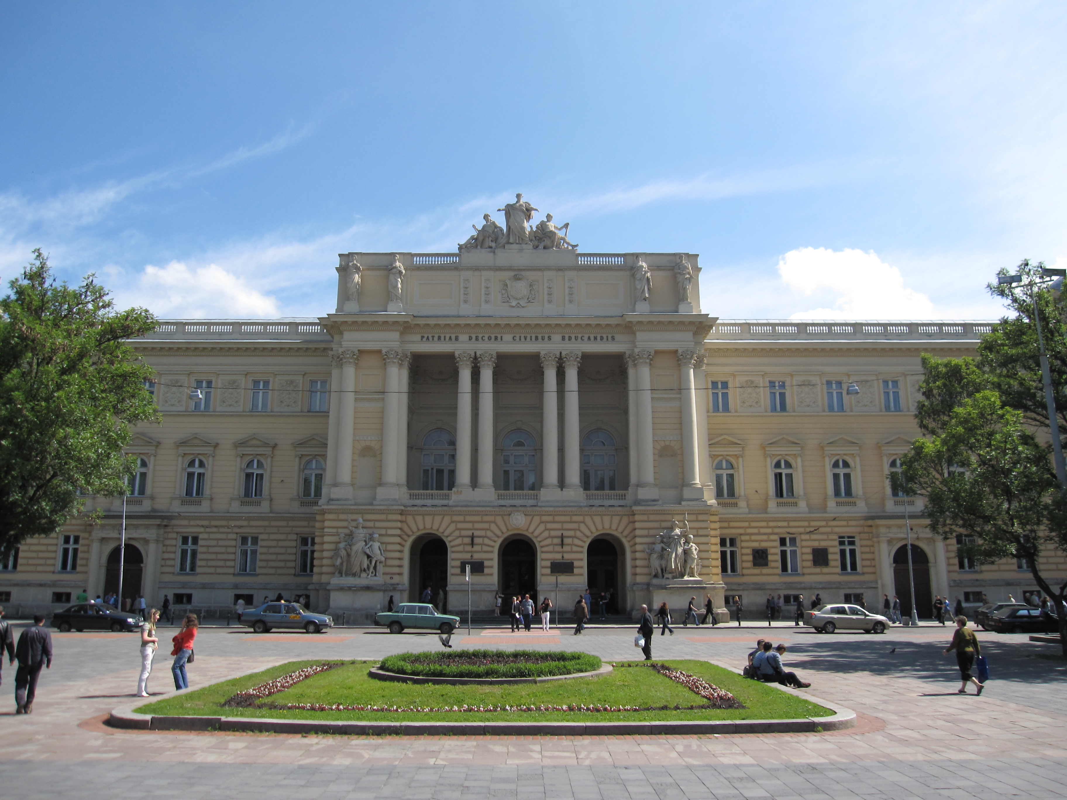 Lviv University